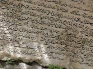 کتیبه مشروطه